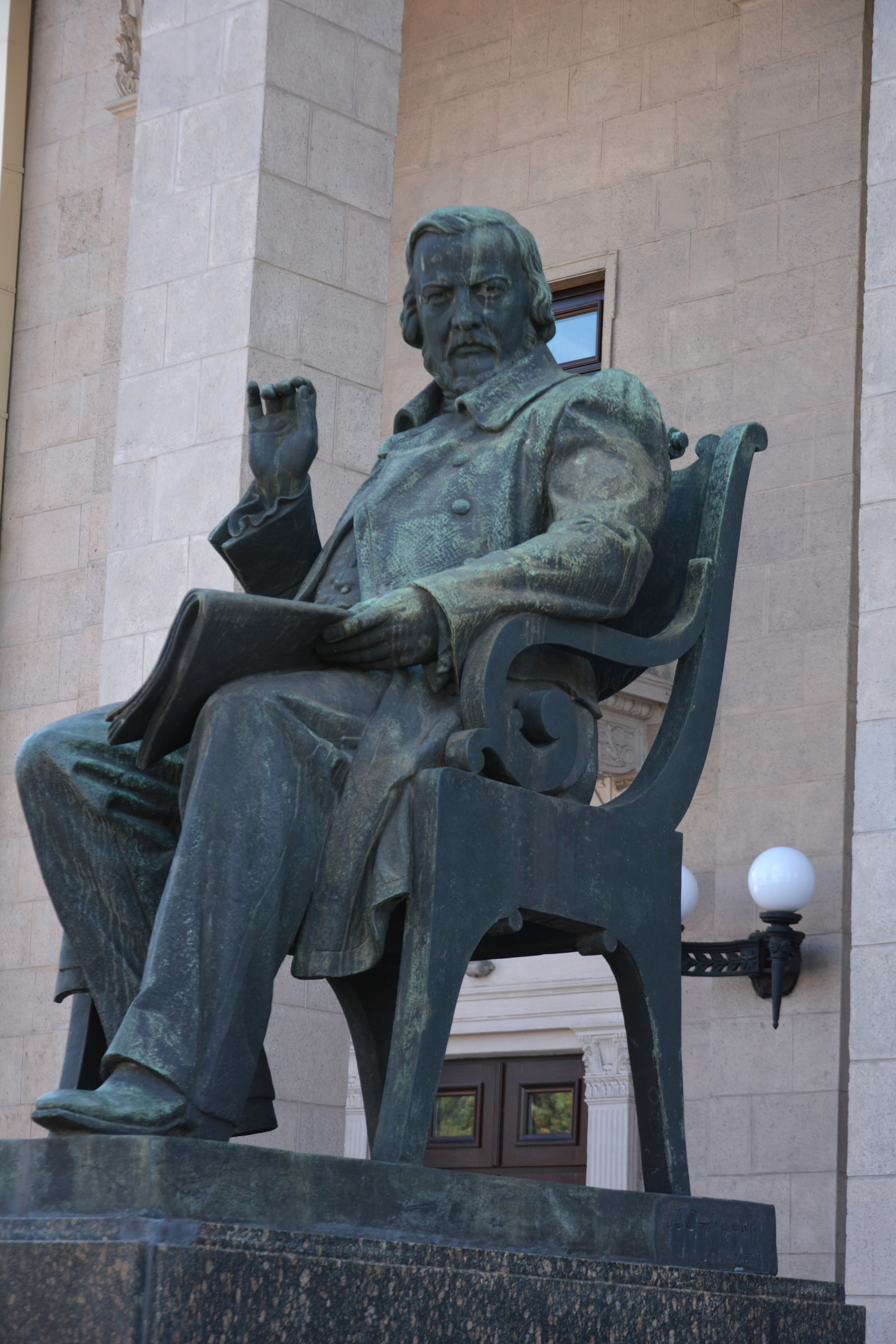 Пам`ятник Глінці М.І. -російскому композитору, Запоріжжя, пр.Леніна, 183а